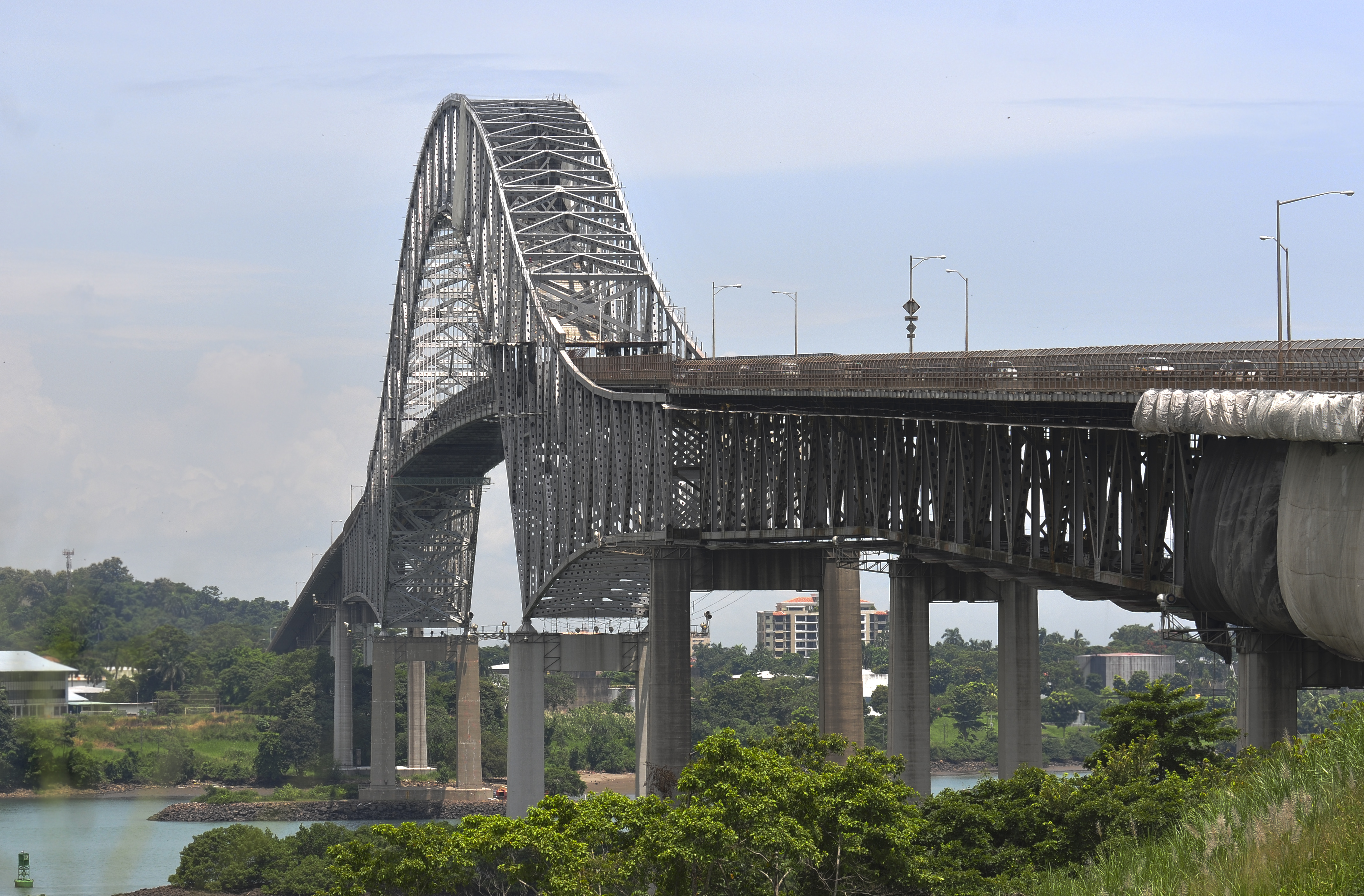 Puente de Las Americas, Panama